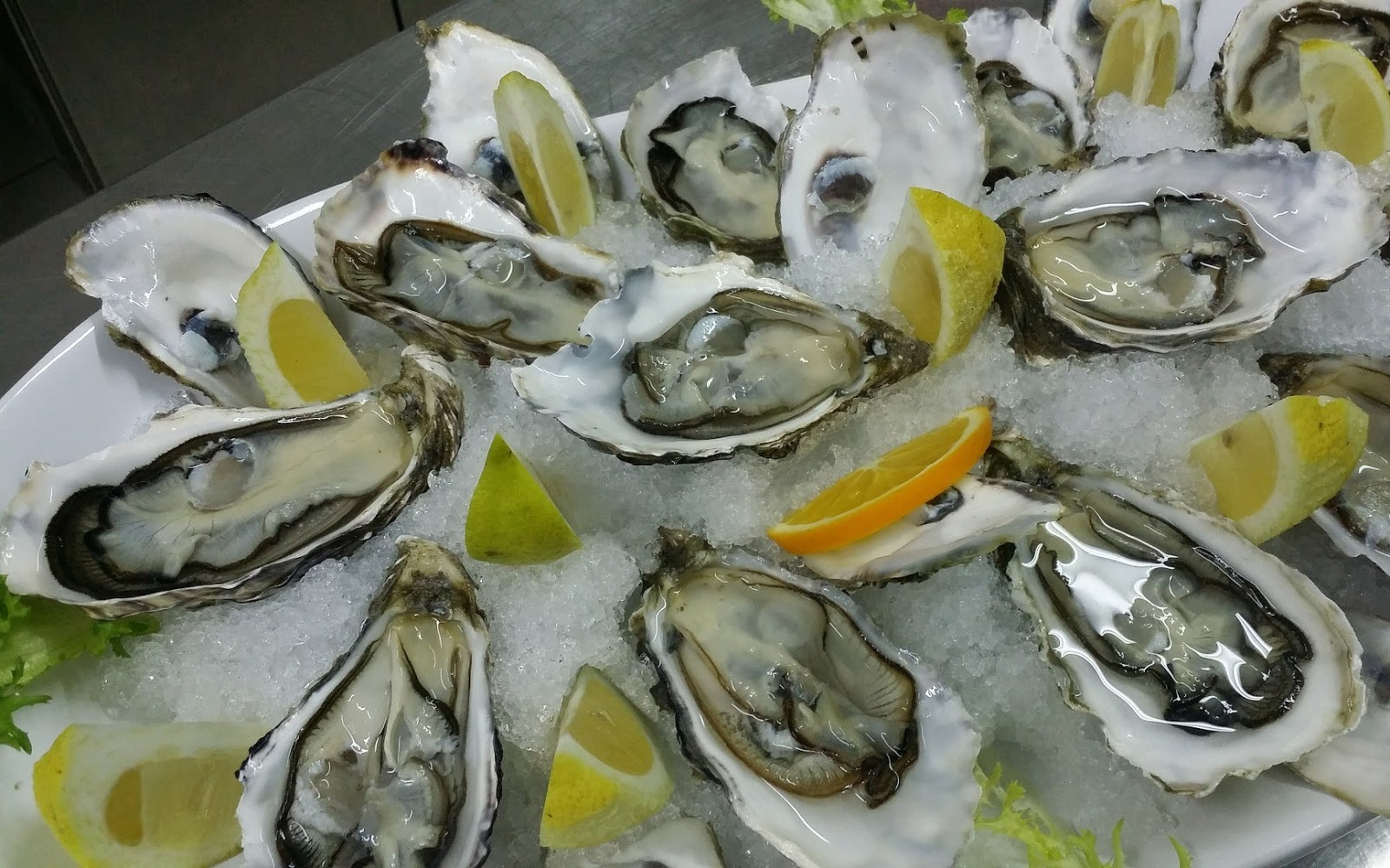 Oyster - stridiya (rusca устрица)- molyusklar içində ən populyarı